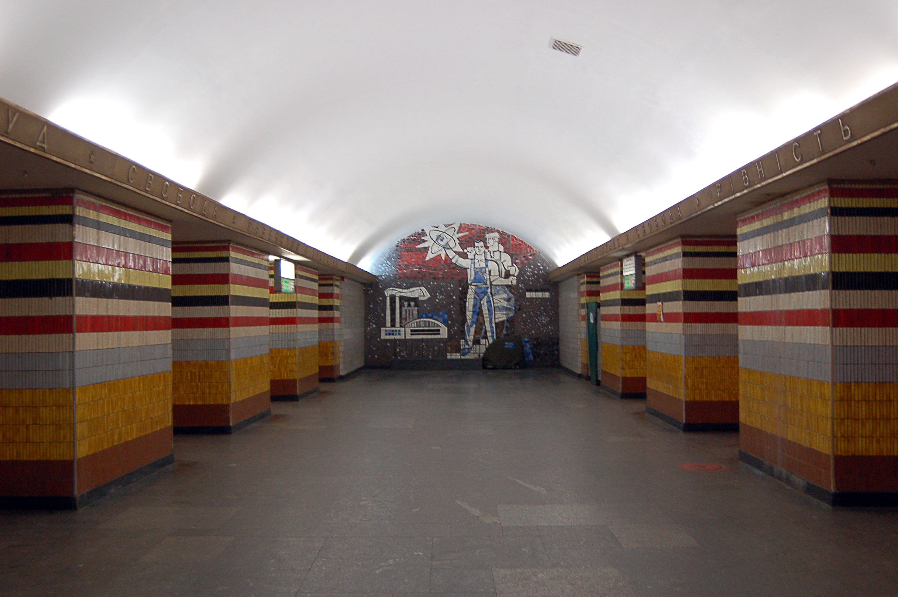 Станция метро «Шулявская», центральный зал